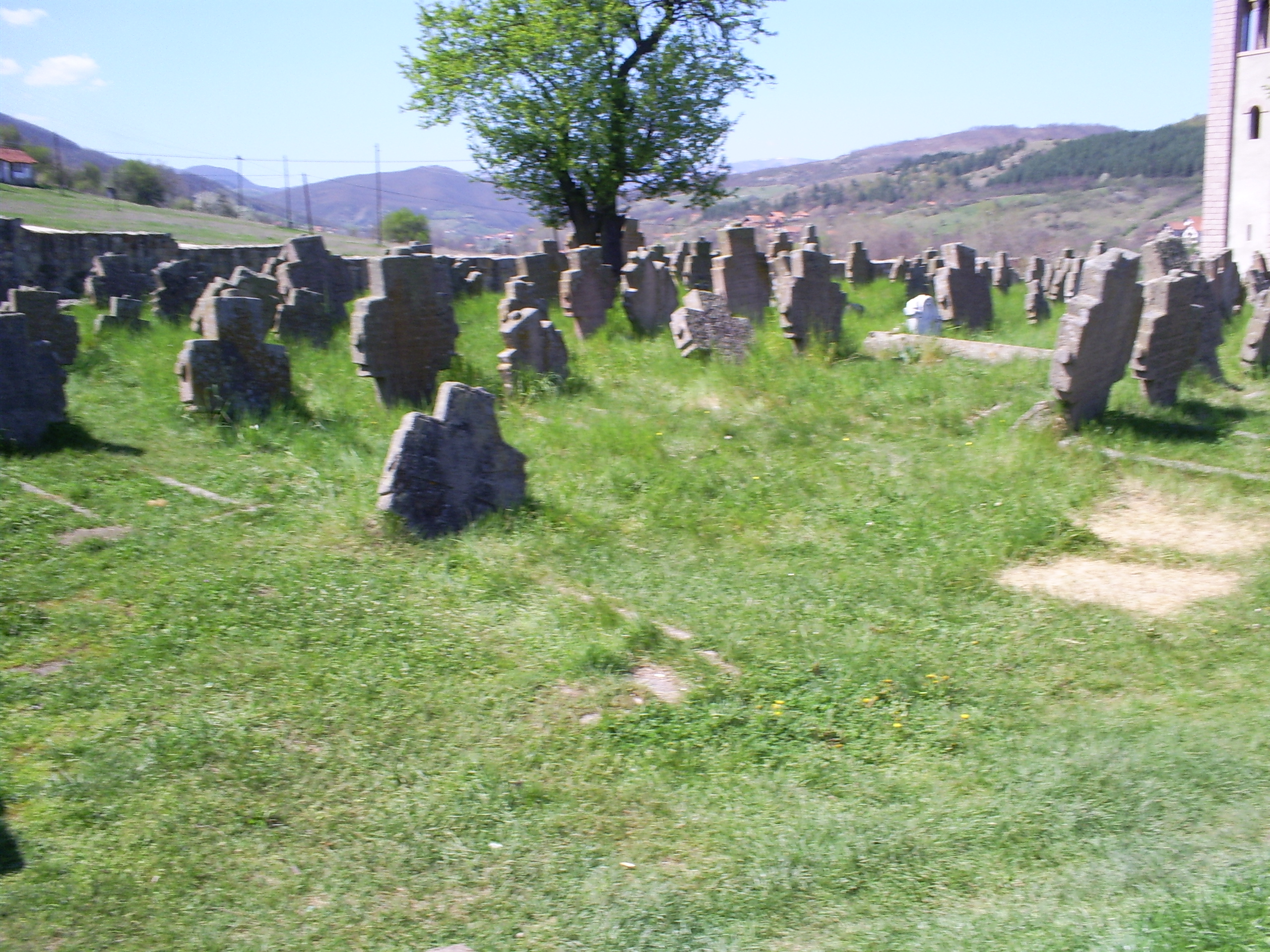 Petrova crkva